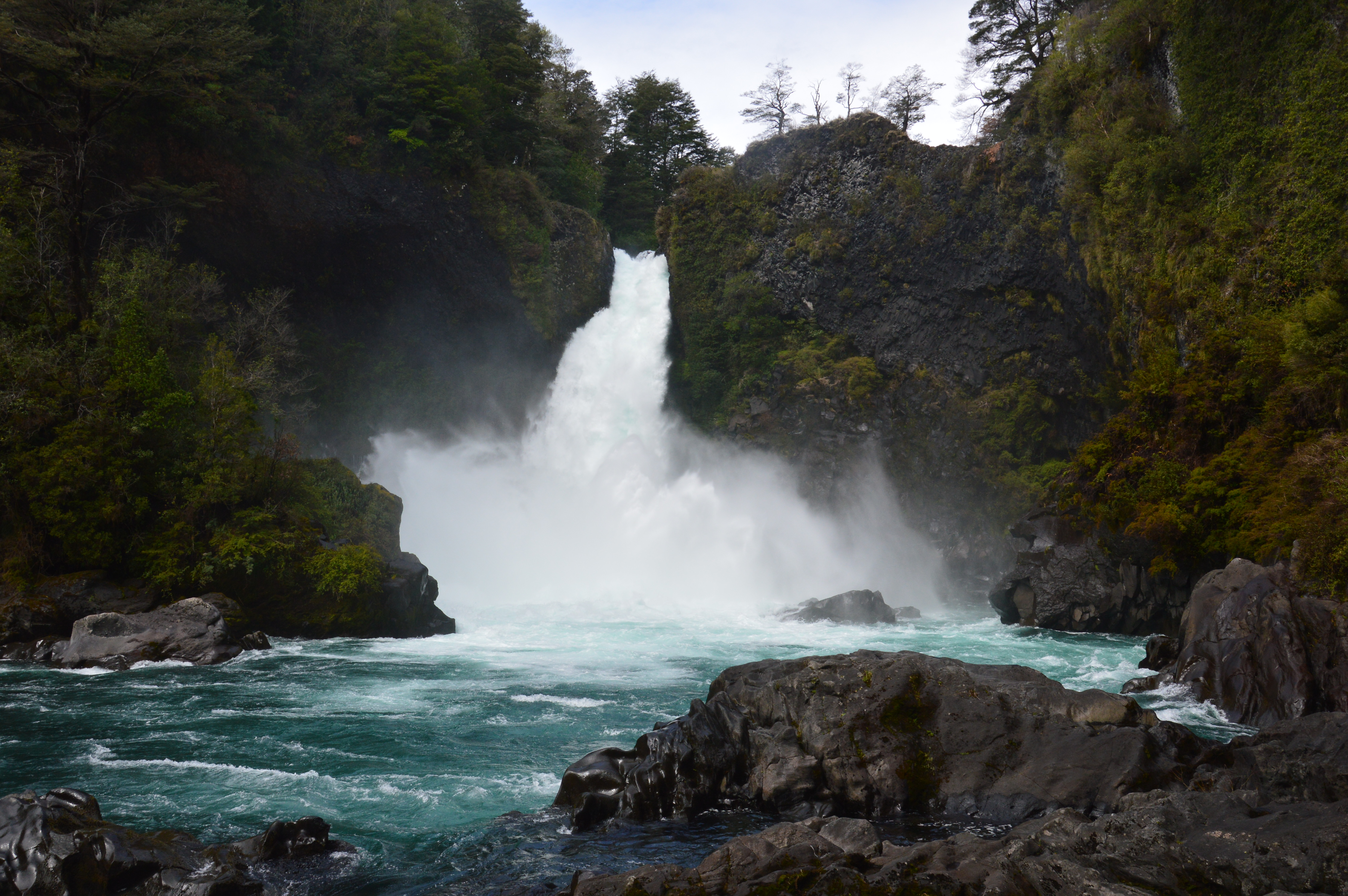 Huilo Huilo Wasserfall